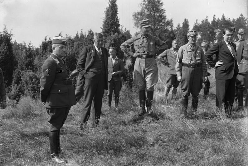 Harnekop: SA Führerschule v. Arnim mit den Führern an der Schlossreppe mit Gauleiter Schlange beobachten die Übungen